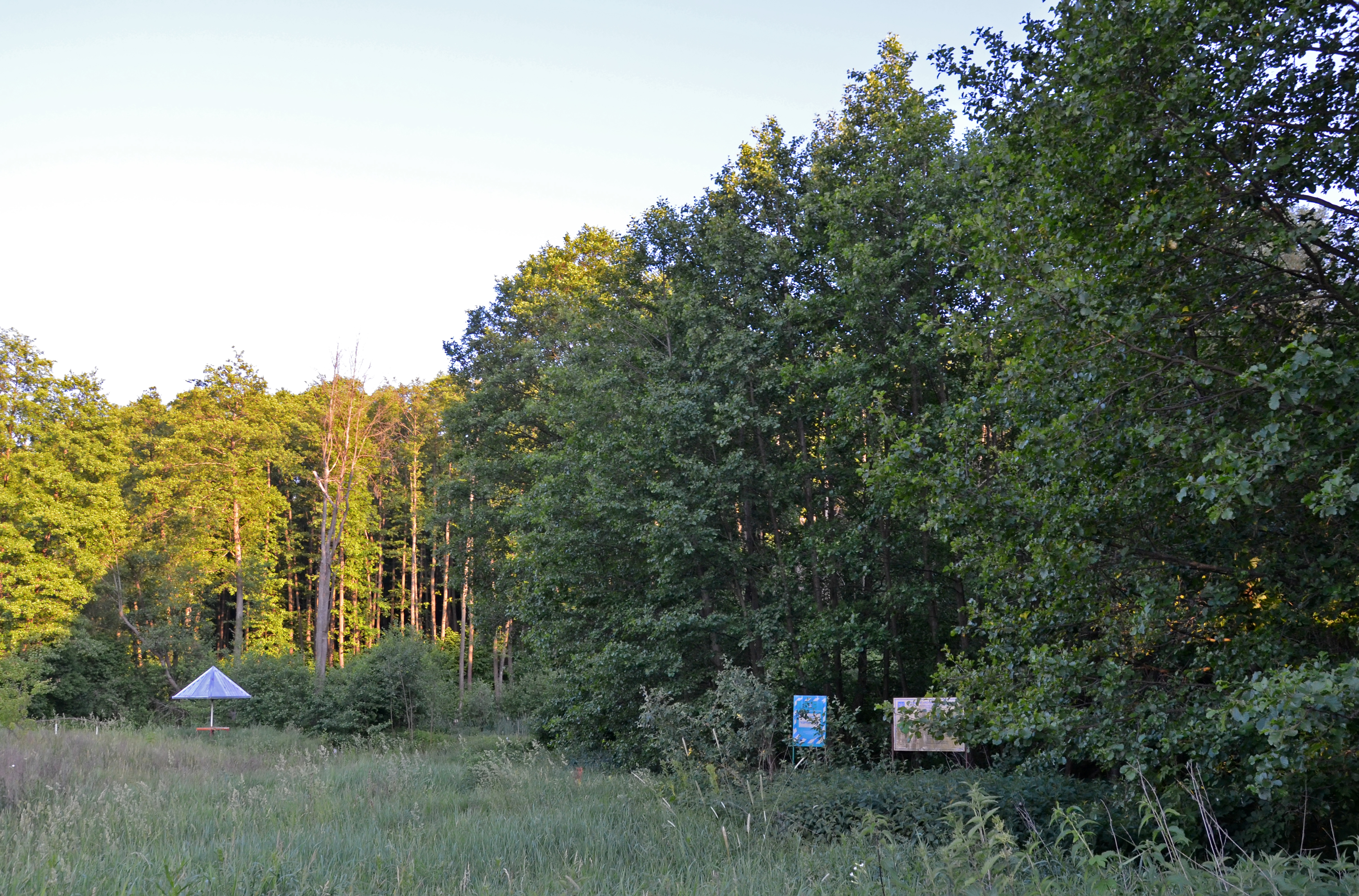 «Корчуватник», Києво-Святошинський район, Шпитьківська сільська рада